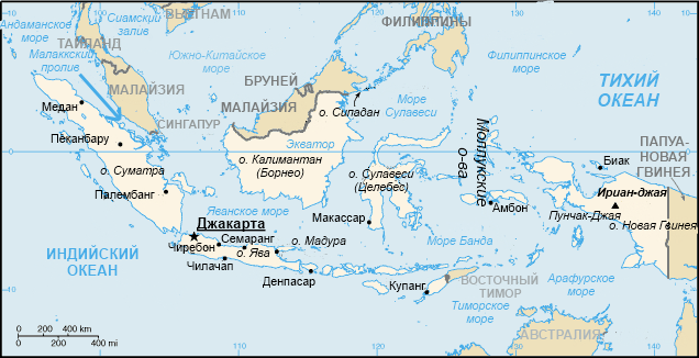 Карта Индонезии